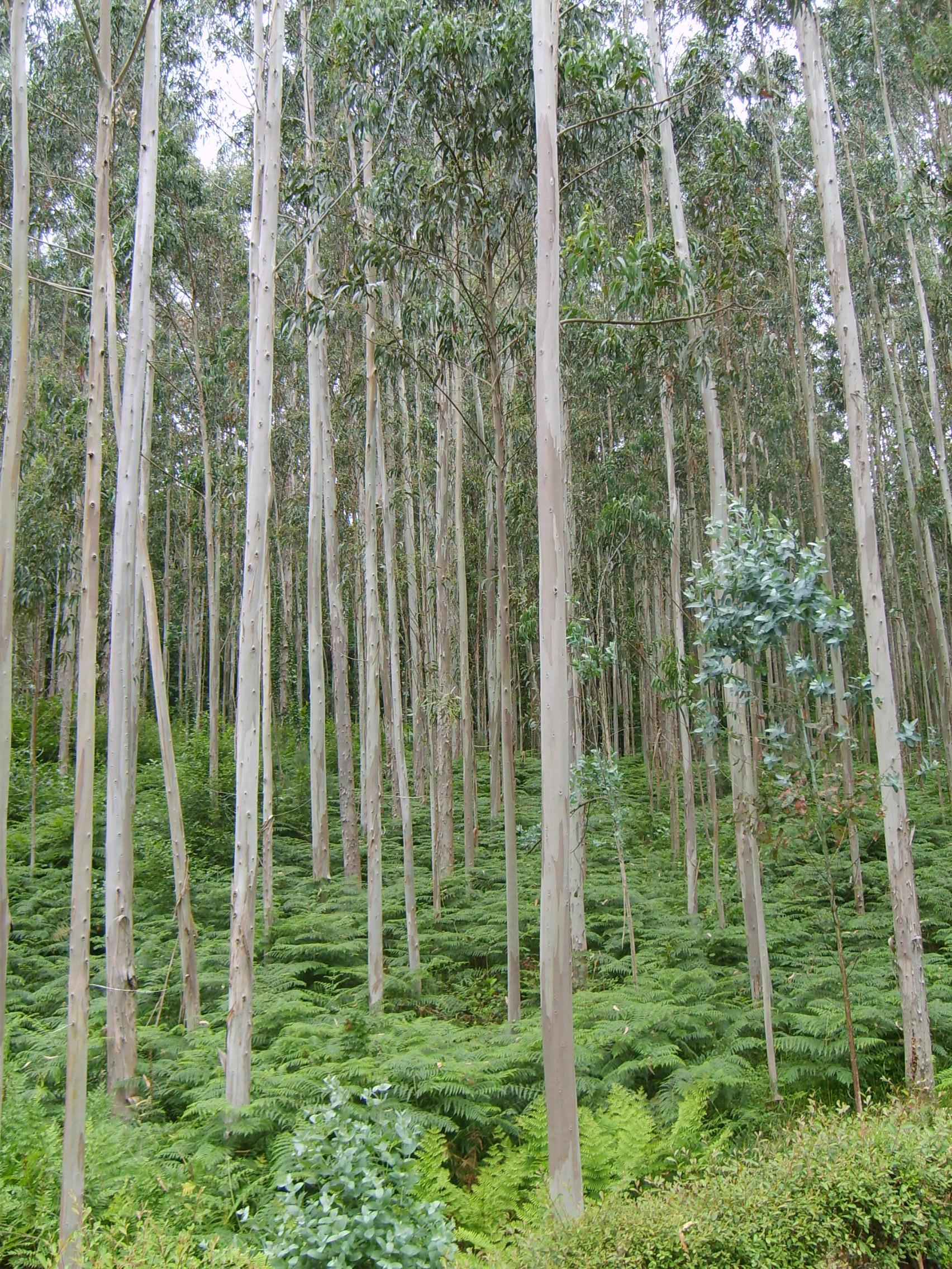 Bosque de eucalipto en Galicia (España) cerca de Viveiro.